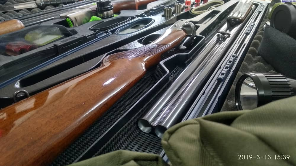 اسلحه ساچمه زنی